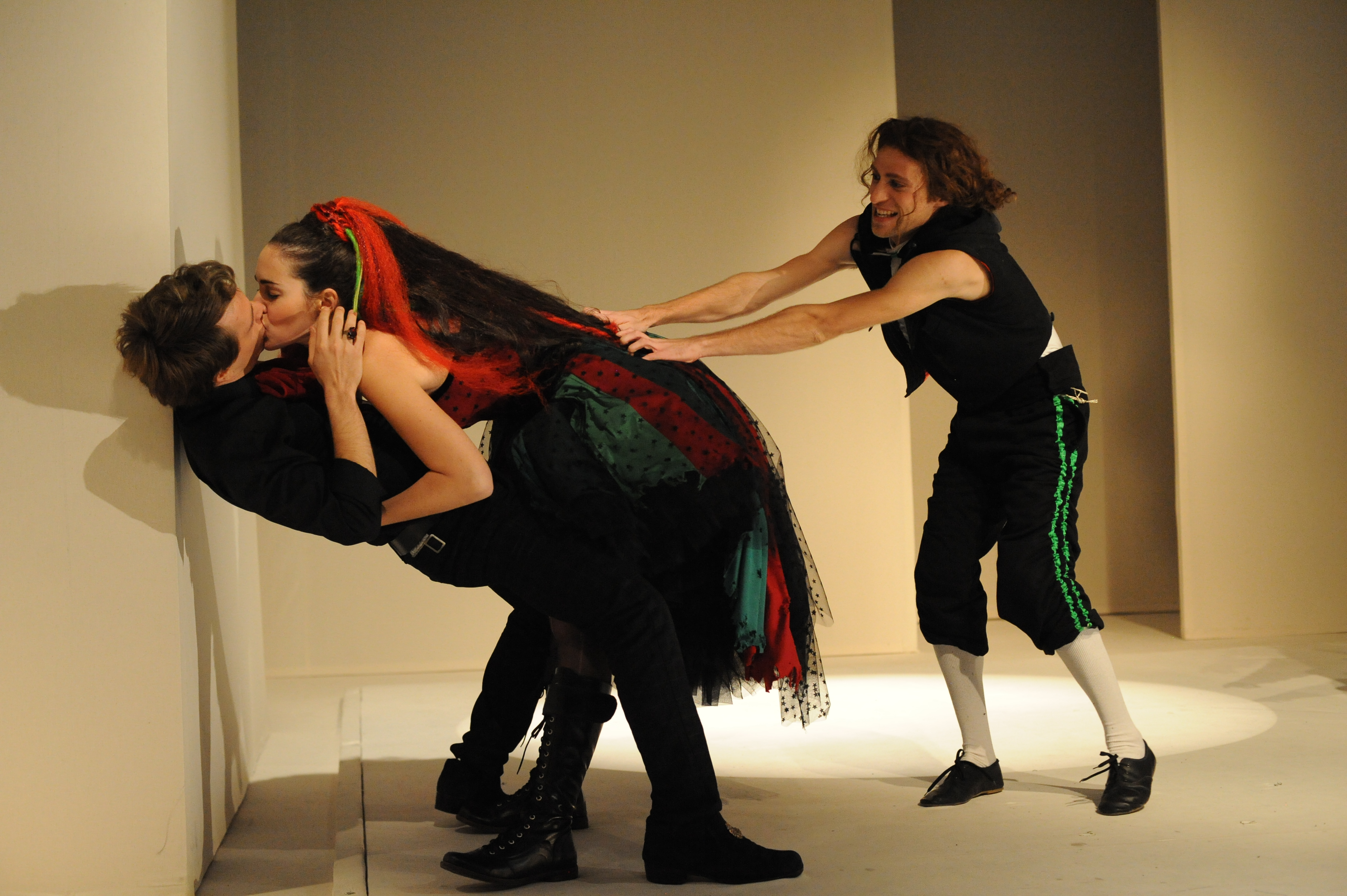 ויטלי פרידלנד, נילי רוגל ואודי רוטשילד בהצגה "תעלולי סקפן", בבימויו של אודי בן-משה, תיאטרון החאן, 2010